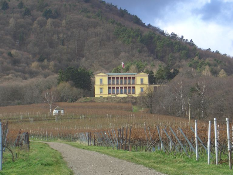 Schloss Villa Ludwigshöhe Fotograf: Uwe Schwöbel